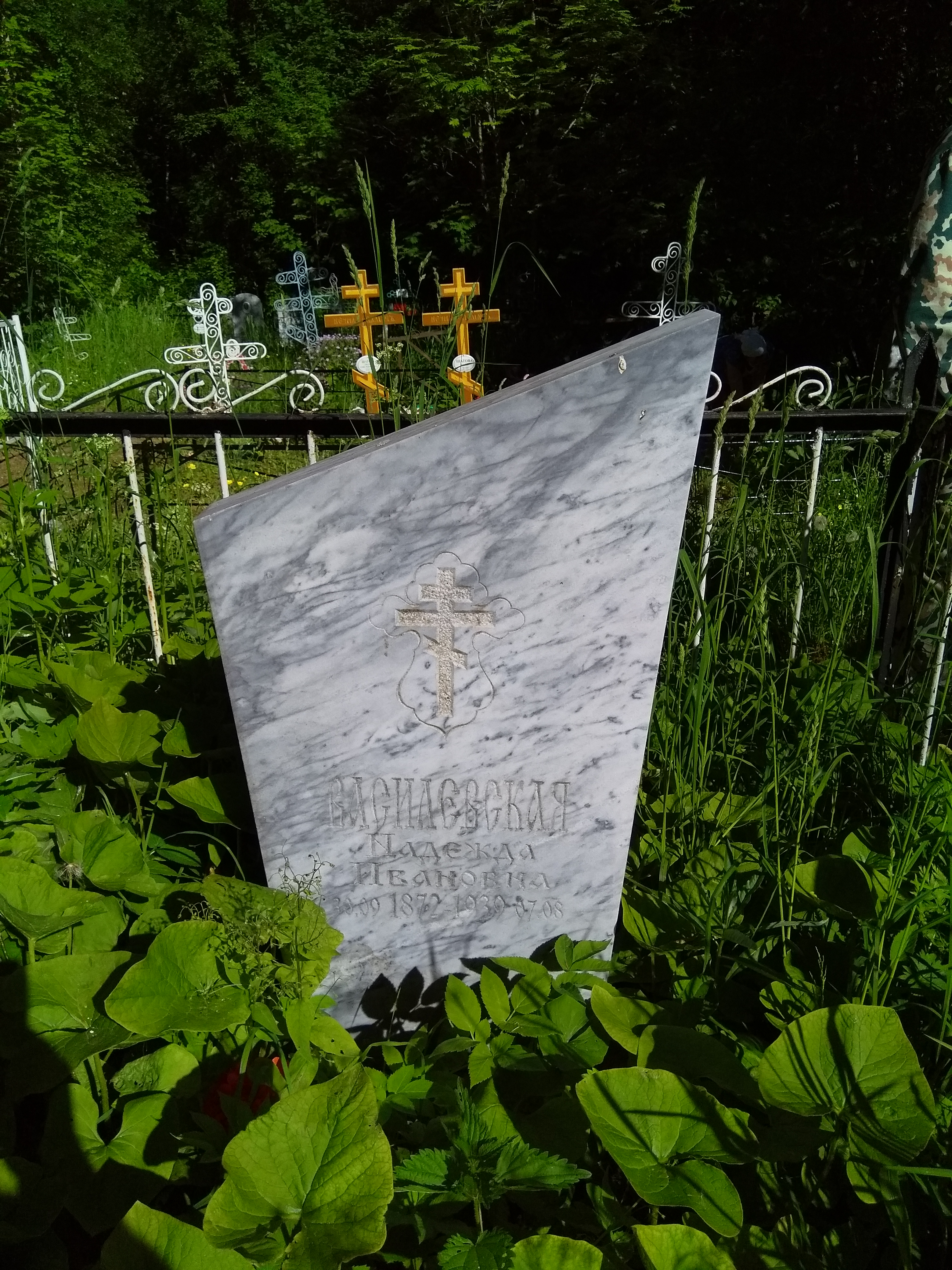 Могила, Надежда Ивановна Василевская, мать маршала А. М. Василевского, урочище Новопокровское, Кинешемский район